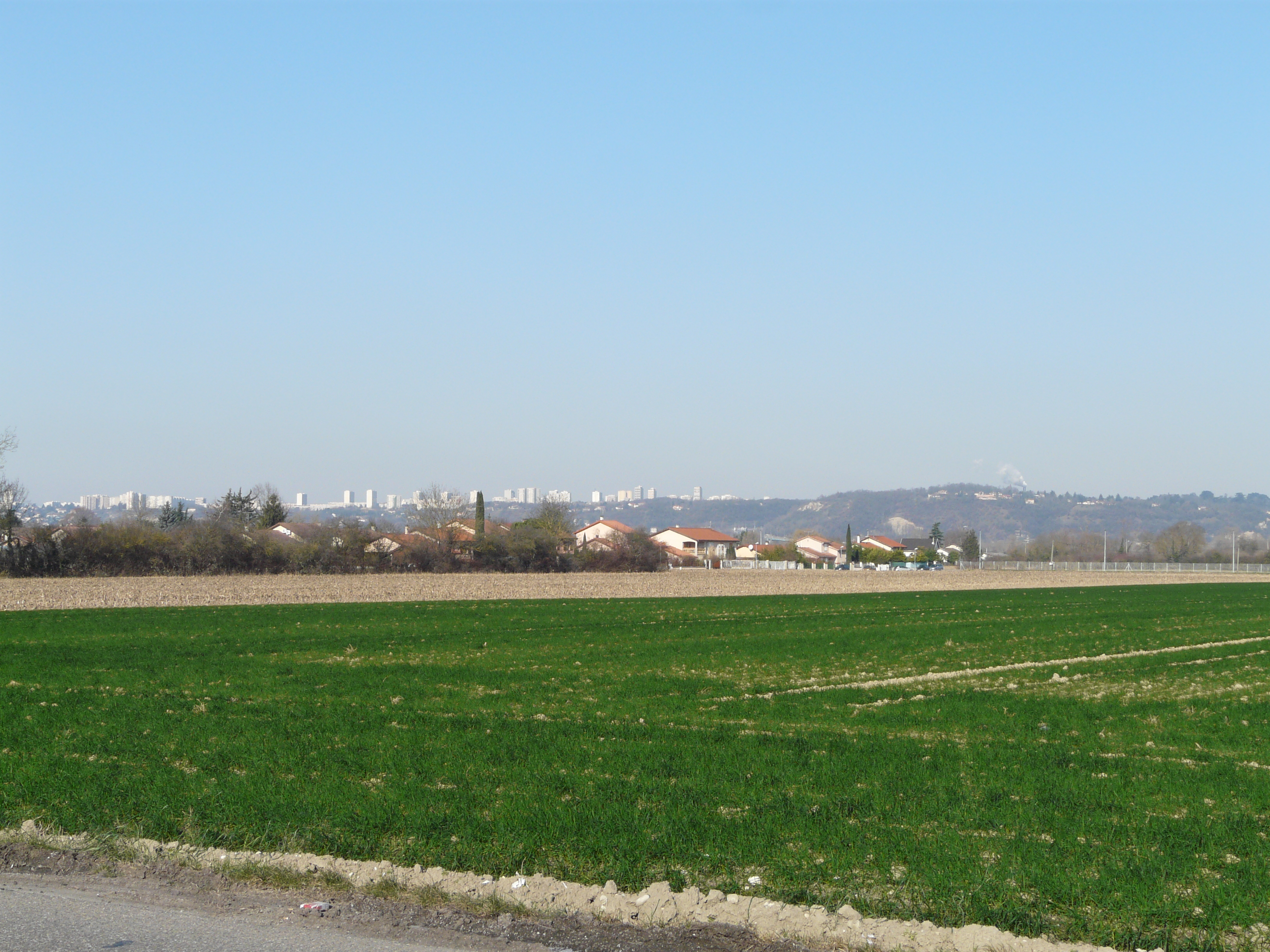 Terres agricoles à Vaulx-en-Velin proches du "Bourg". Au fond, la Cotière et les tours de Rillieux-la-Pape.